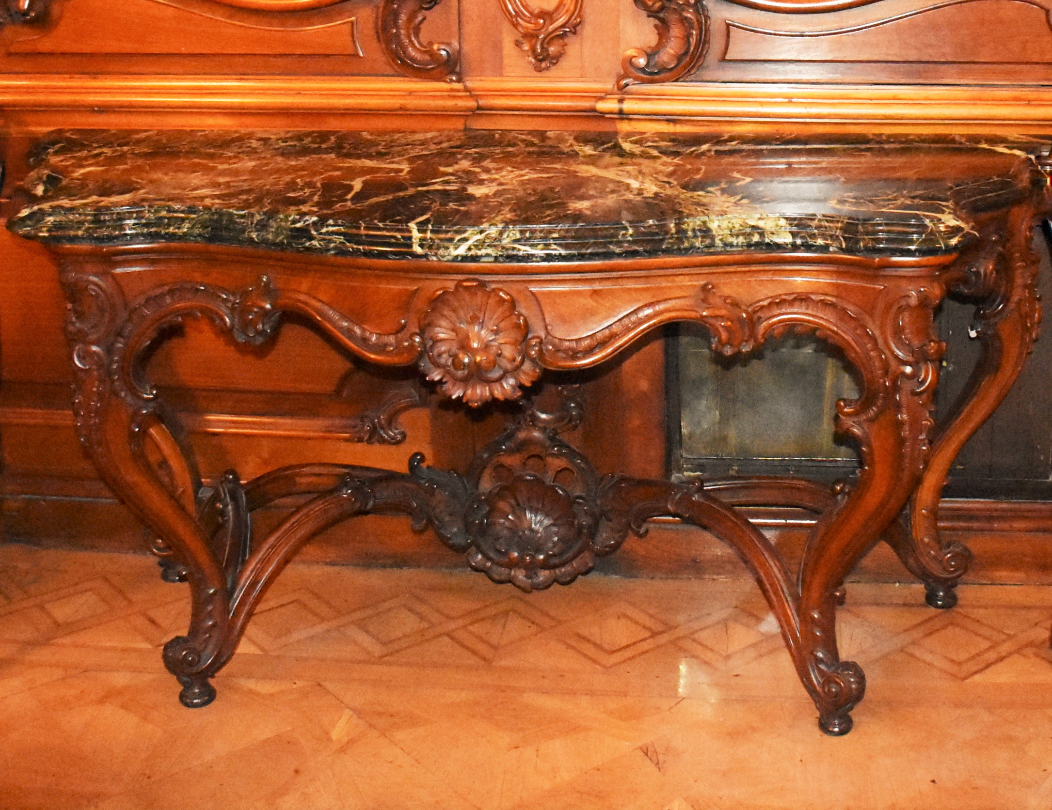 Hofburg - Ahnensaal, Sterbezimmer Kaiser Franz II./I. Dieses Bild wurde anlässlich des österreichischen Tags des Denkmals 2015 in Wien eingereicht.